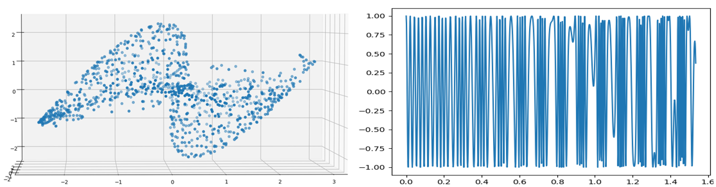 ענן הנקודות הנוצר מאות מאופנן FM